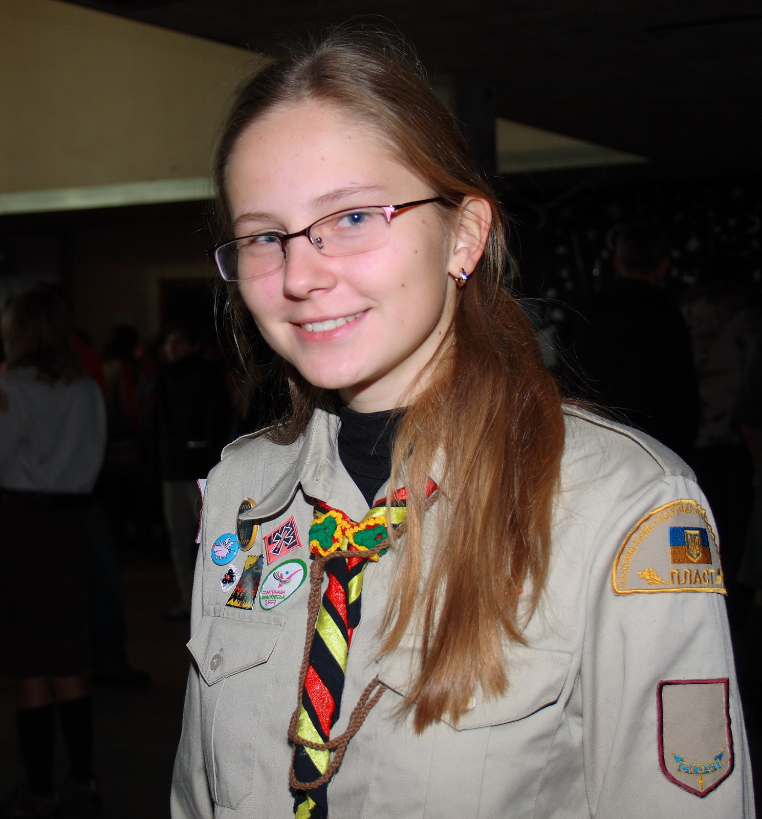 Орликіада 2007